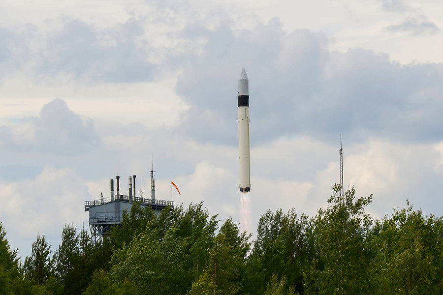 Пуск ракеты космического назначения легкого класса «Рокот» с блоком космических аппаратов связи «Гонец-М» (ГИК Плесецк, Архангельская обл.)